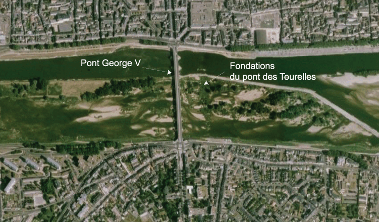 Tracés du pont George V et du pont des Tourelles (détruit en 1760) à Orléans - département du Loiret - France